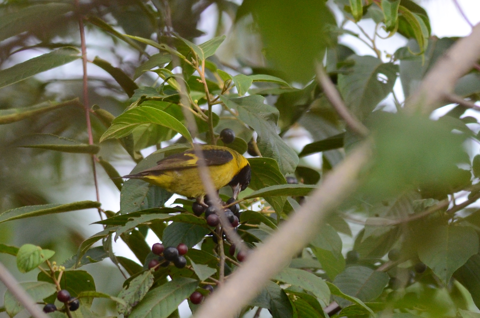 Huauchinango, Puebla, México. Julio 2013